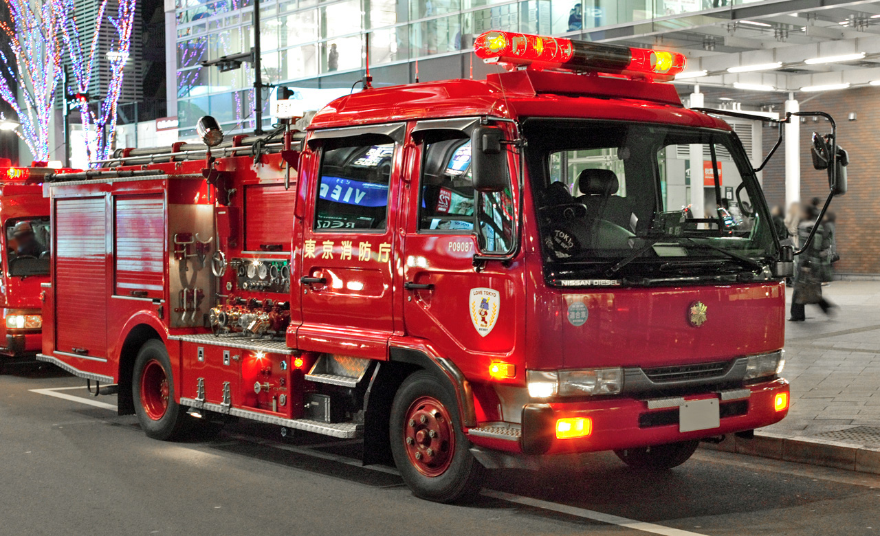 Nissan Diesel Condor Fire engine